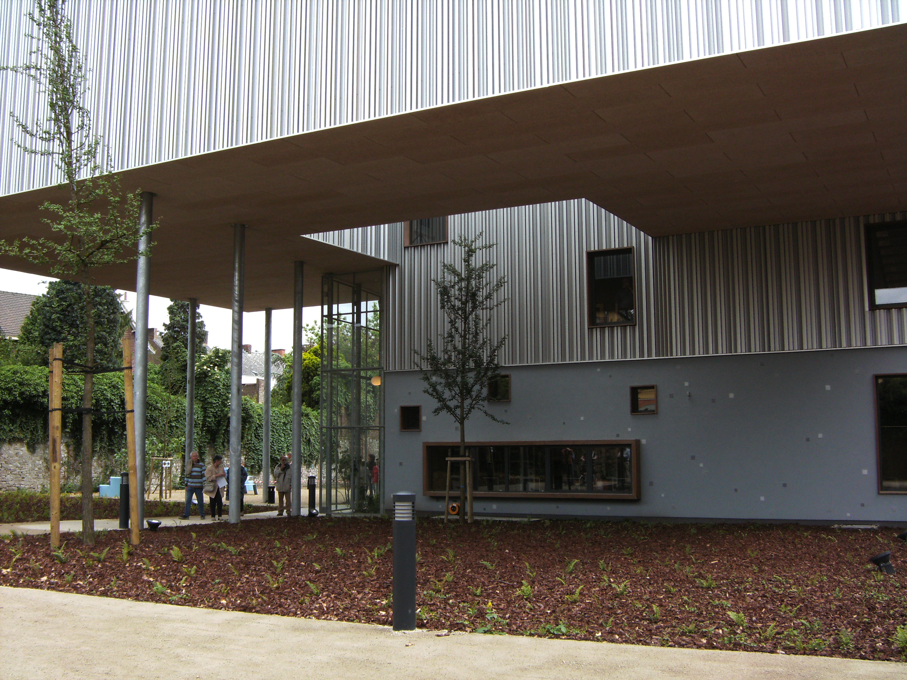 Musée de la photographie à Charleroi - nouvelle aile inaugurée le 1 juin 2008